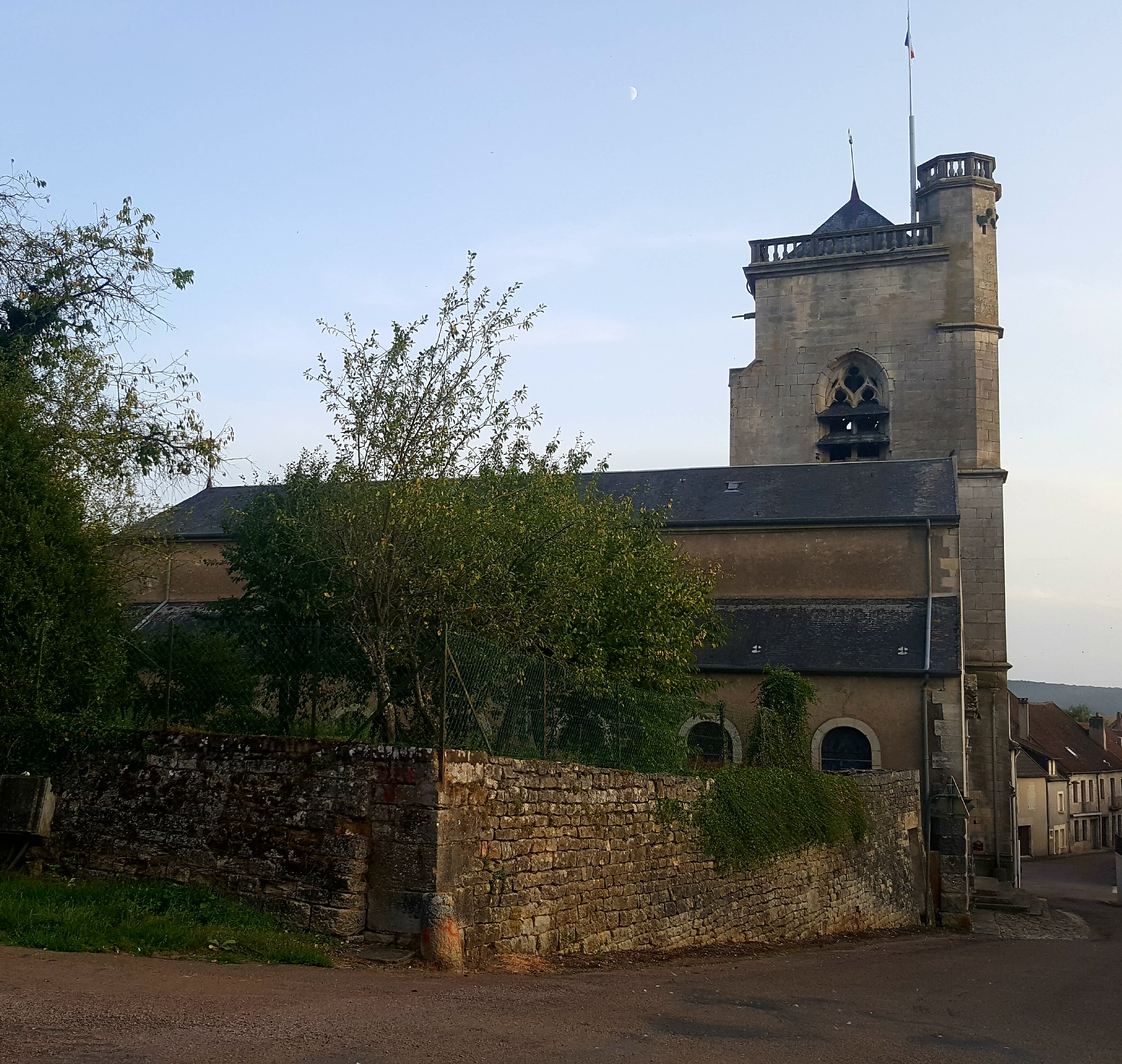 Vue complète de l'église Saint-Martin de Dornecy